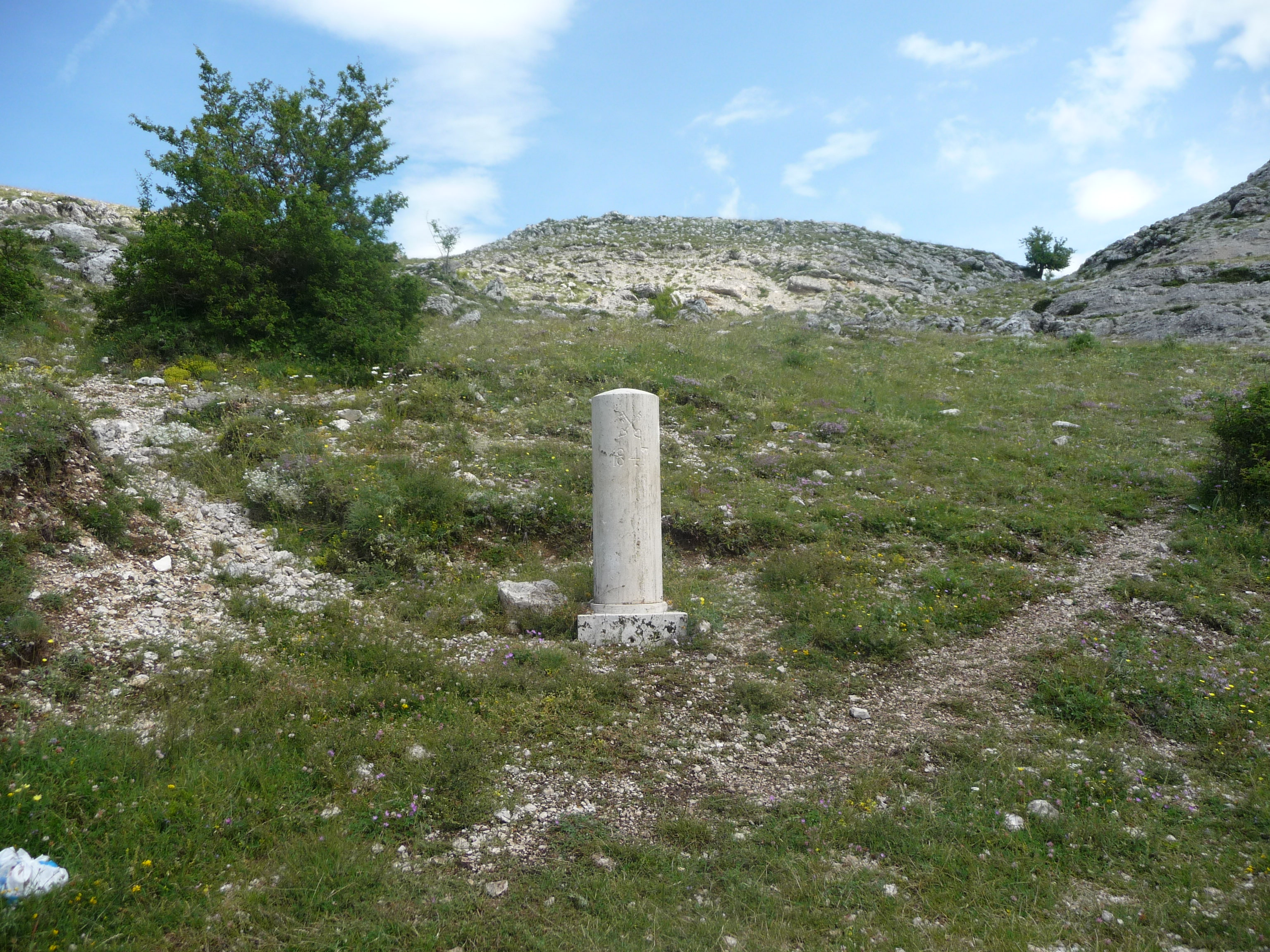 Antico cippo di confine fra Stato della Chiesa e Regno delle 2 Sicilie